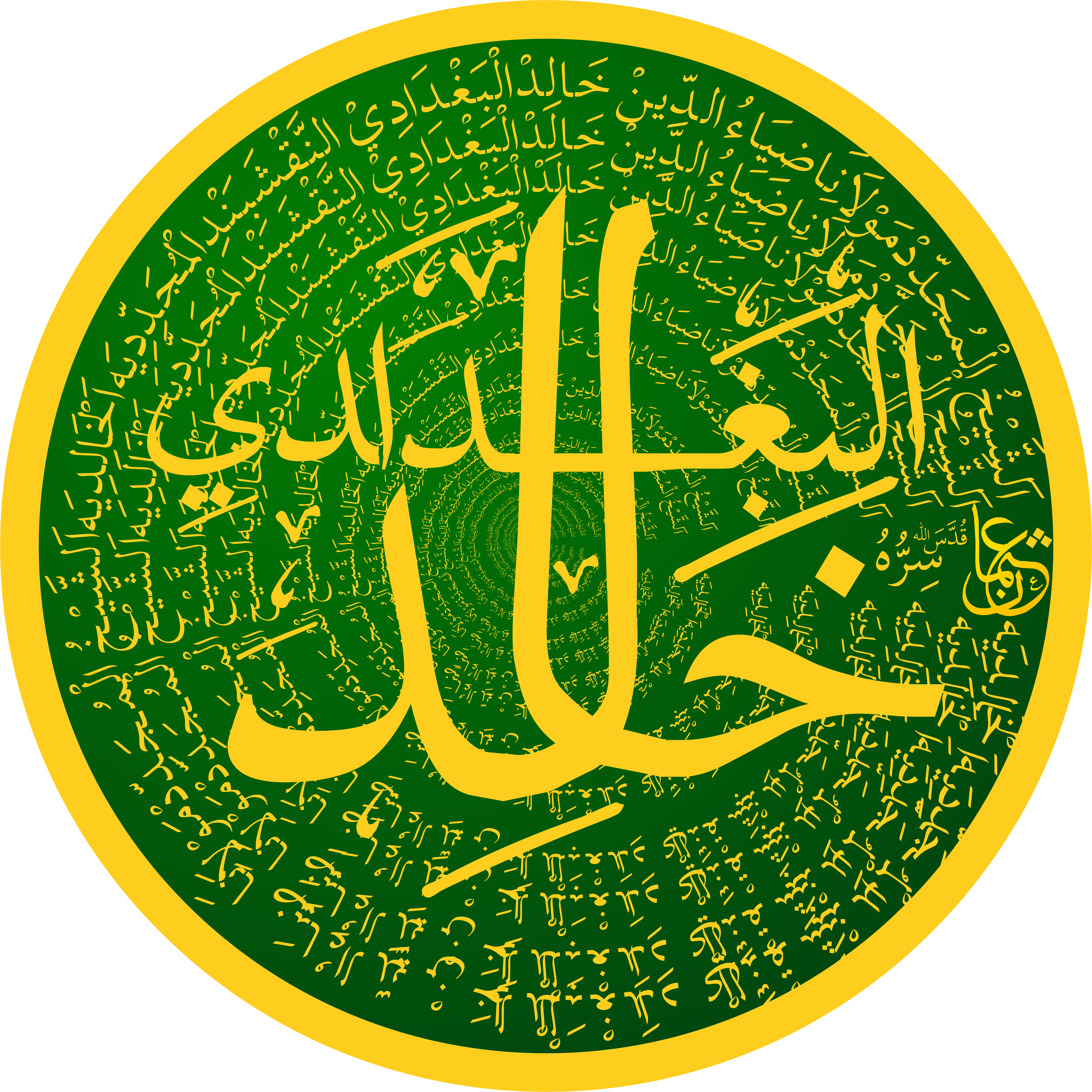 Naqsyabandi Khalidiyah